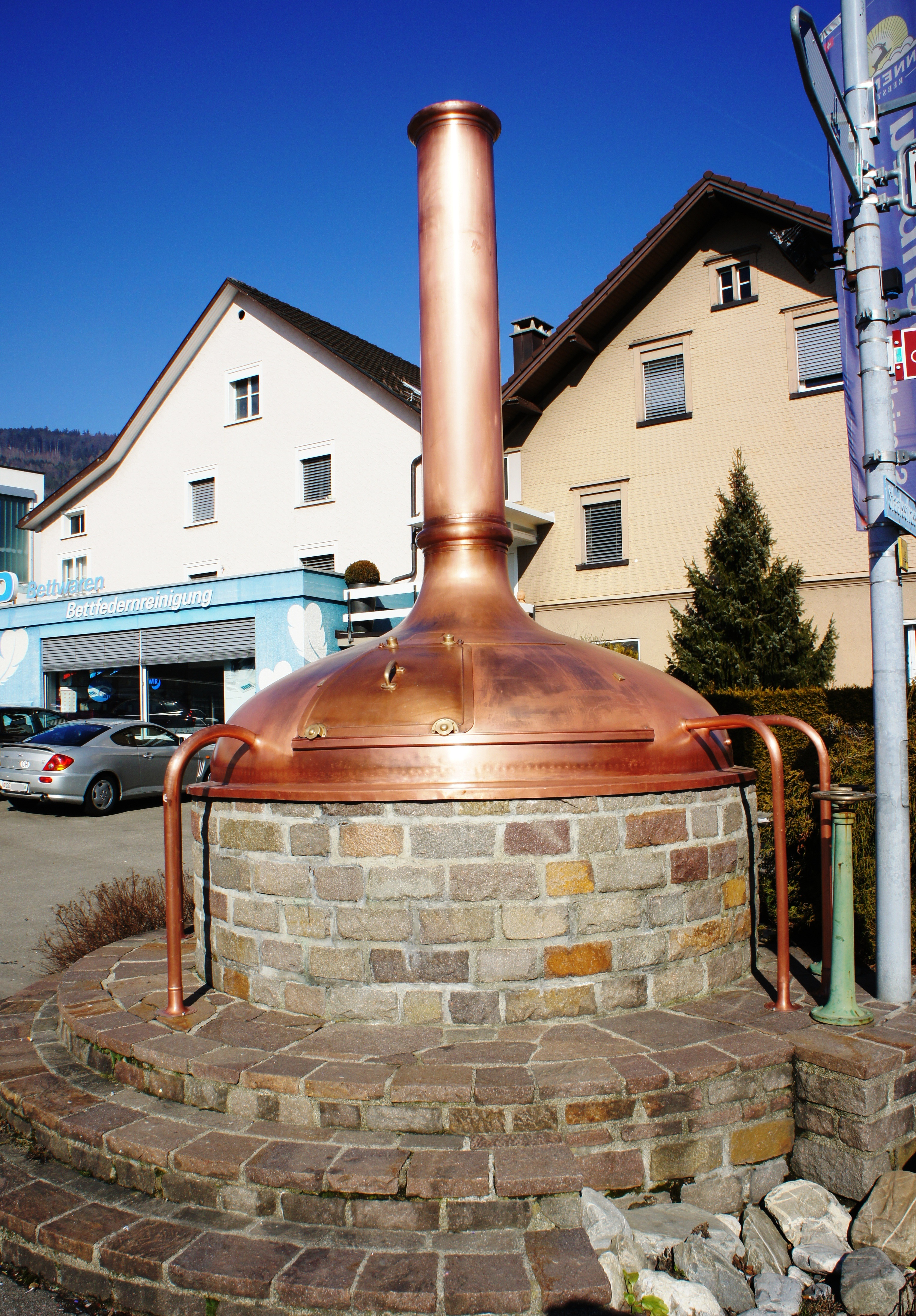 Alter Sudkessel der Sonnenbräu - als Blickfang an der Hauptstrasse in Rebstein. Am linken Bildrand ist ein Gebäudeteil der Sonnenbräu zu erkennen.